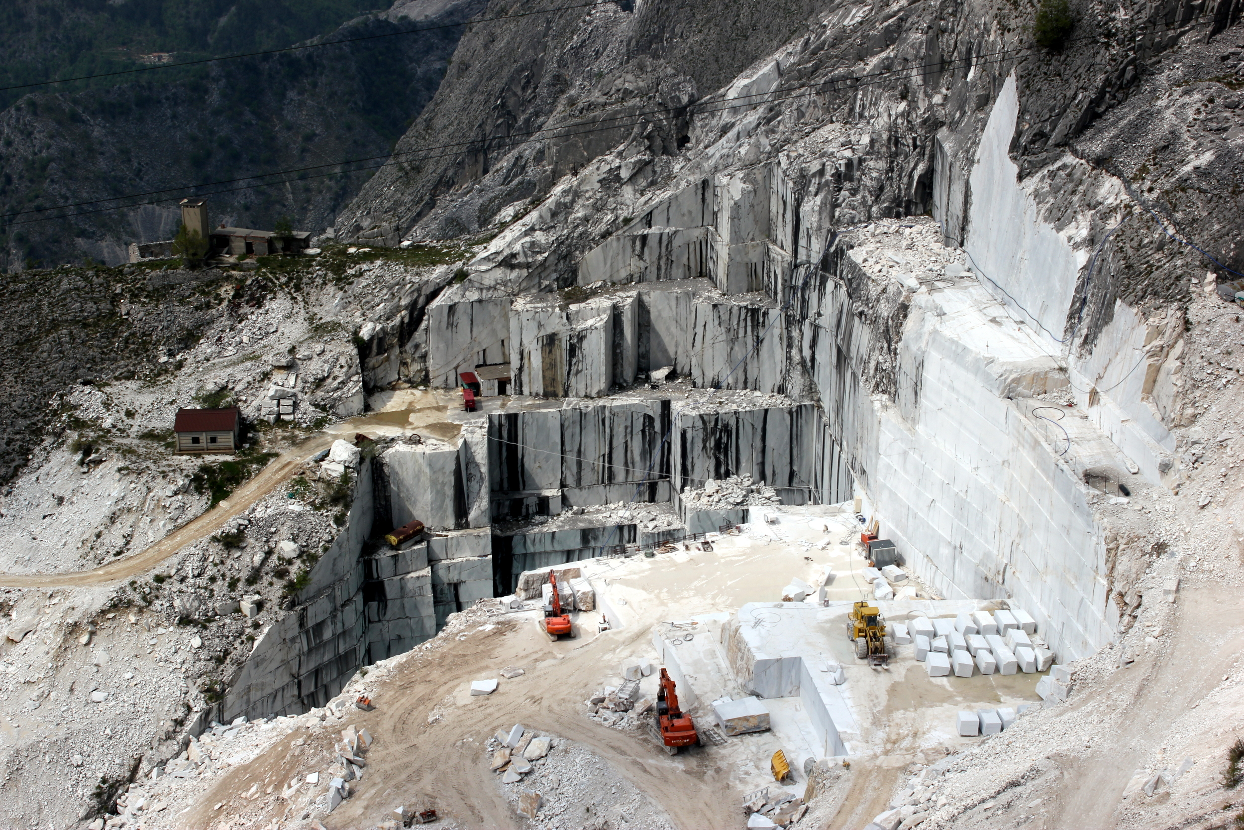 Marmorsteinbruch bei Carrara, Italien.